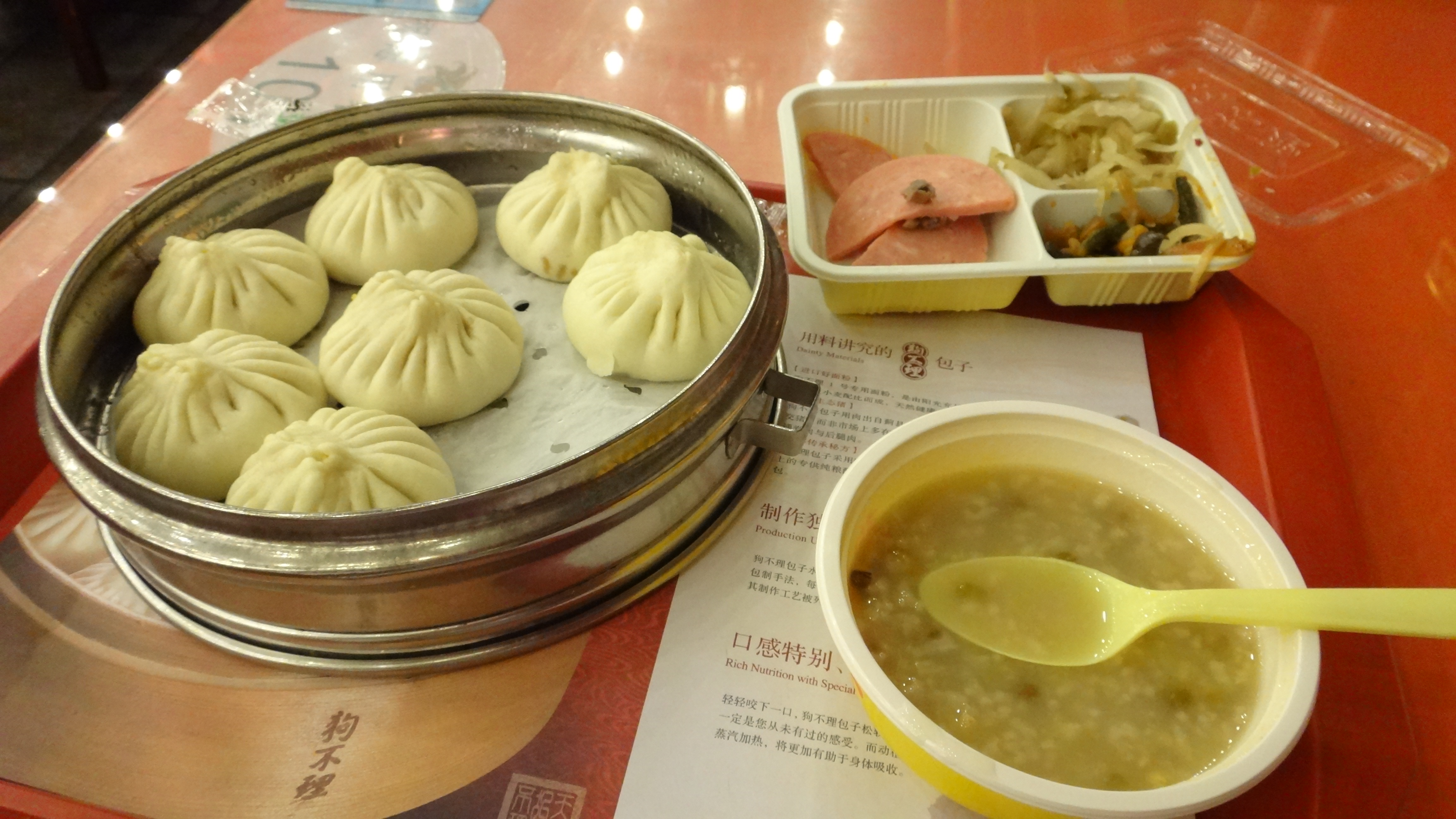 中文（中国大陆）: 天津南市食品街的狗不理包子。